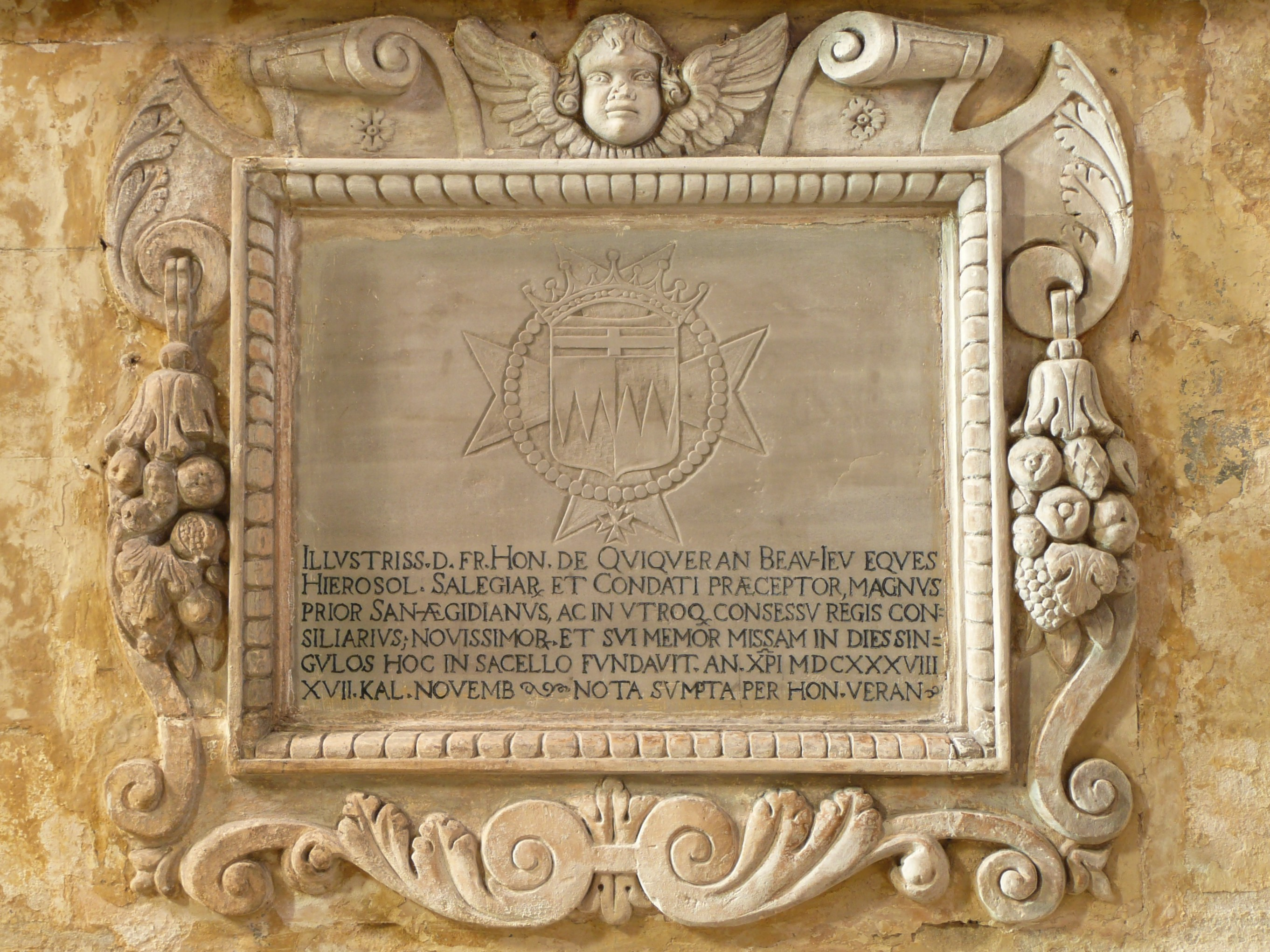 Arles (Bouches-du-Rhône, France), église St Césaire dans le quartier de la Roquette, ancienne église conventuelle des Grands-Augustins, commencée en 1258, remaniée à plusieurs reprises au cours des siècles, seule paroisse de ce quartier et troisième église de la ville ancienne encore utilisée. Dans la chapelle du Sacré-Cœur, plaque commémorative de la fondation d'une messe basse perpétuelle aux dépends et au bénéfice d'Honoré Quiqueran de Beaujeu, chevalier de l'ordre de St Jean de Jérusalem, commandeur des commanderies de St Pierre de Salliers et de Condat, grand prieur de St Gilles, conseiller du roi en ses conseils d'État et privé, dont le cœur repose dans le mausolée voisin.